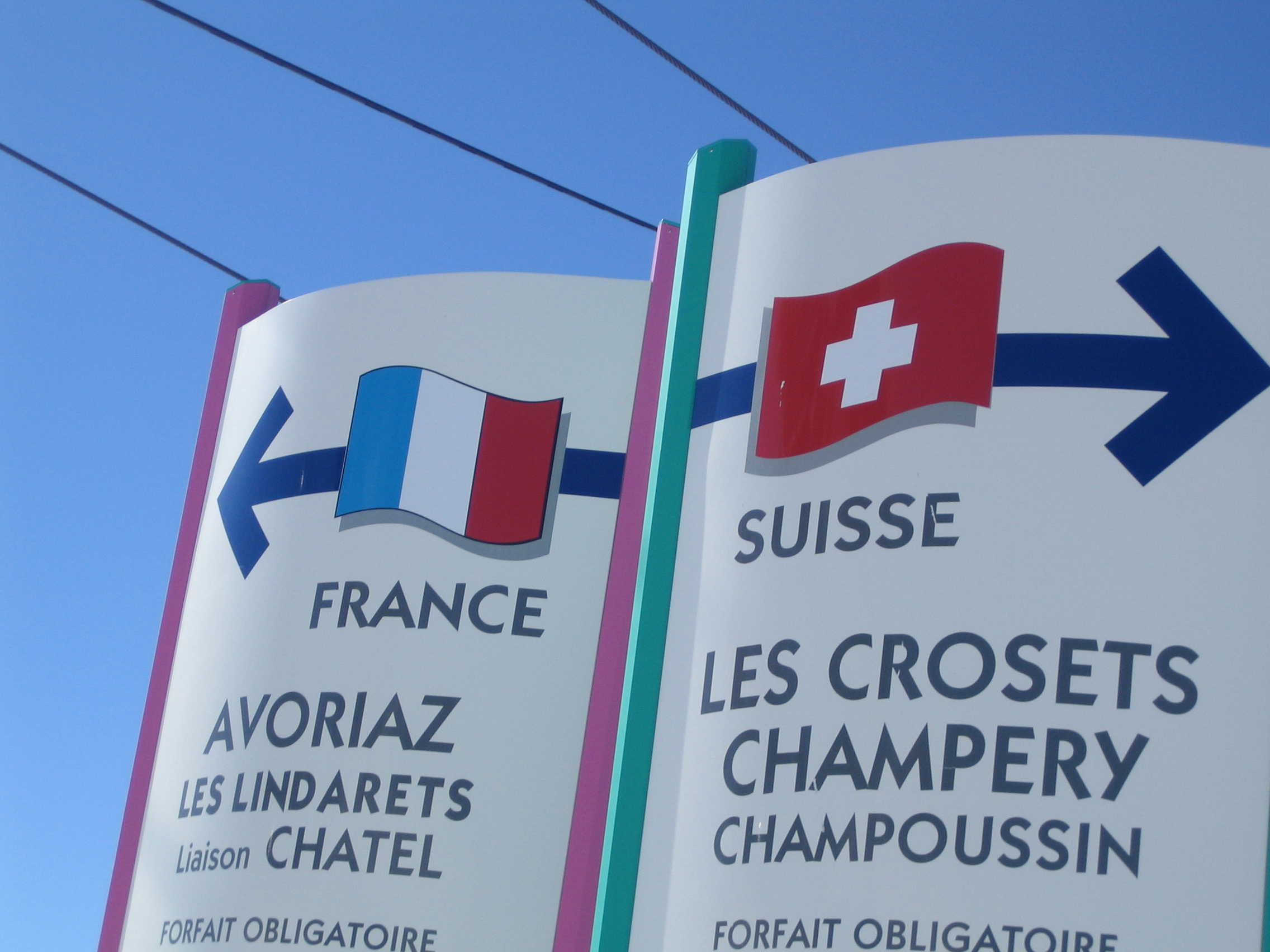 Op de skipiste op de helft van Frankrijk en Zwitserland.